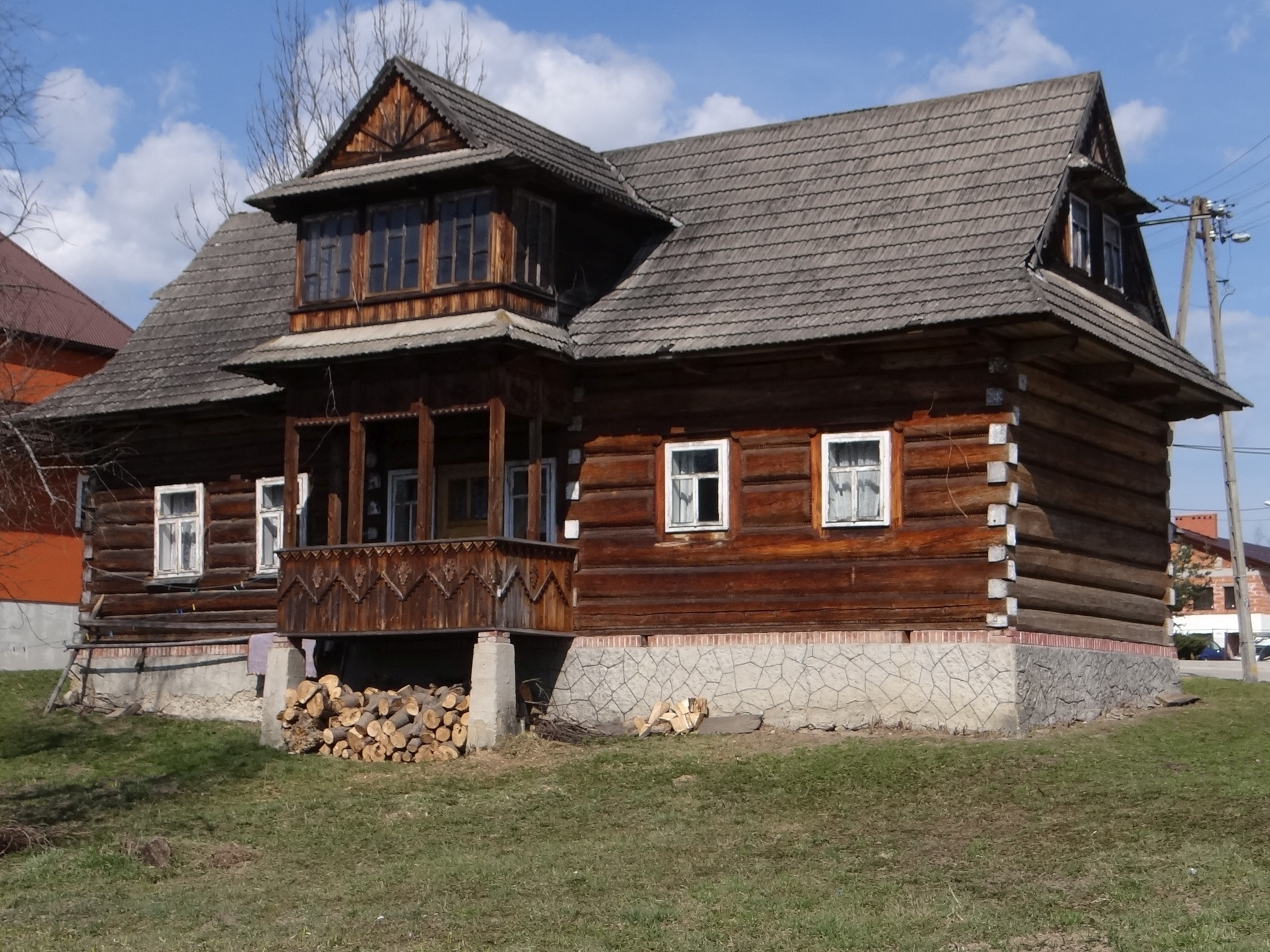 Rogoźnik